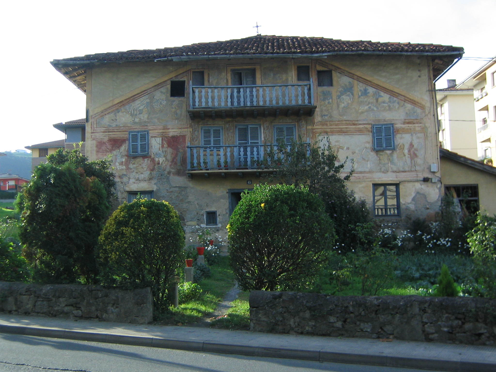 Etxe pintatua de Berriatua, Vizcaya, País Vaco, España.